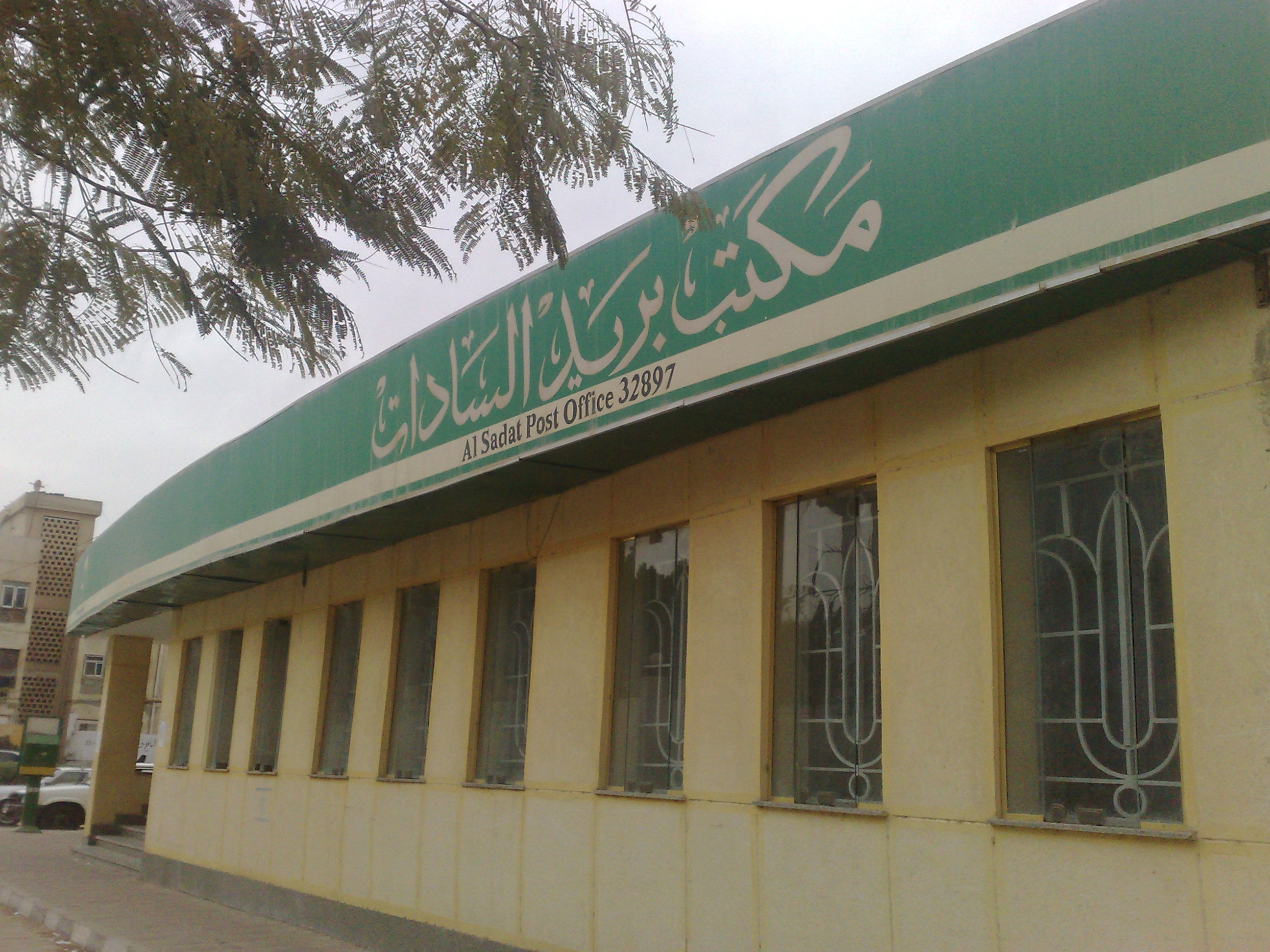 مكتب البريد الرئيسي بمدينة السادات